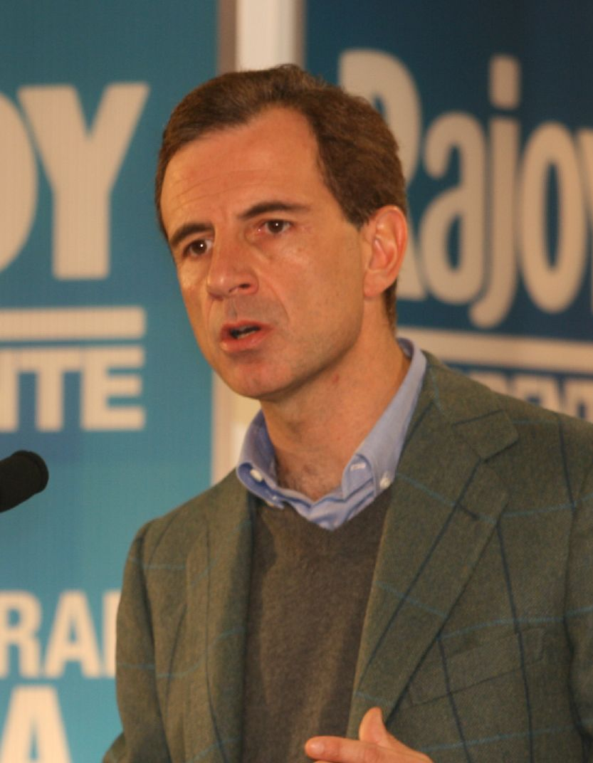 Juan Costa en las jornadas Para mejorar tu vida organizadas por el Partido Popular celebradas el 2 de noviembre de 2007 en Madrid.